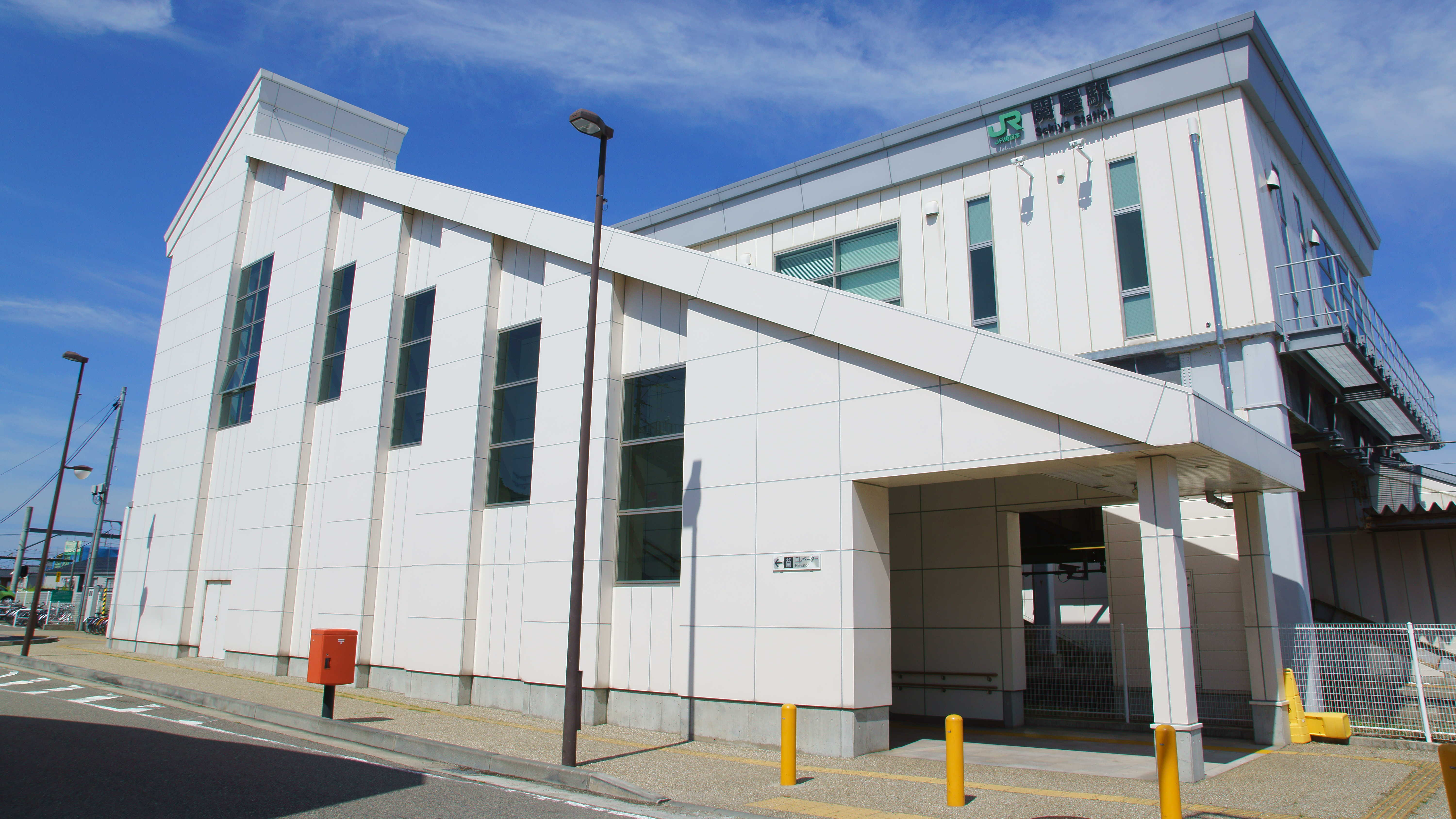 南口（2016年8月）